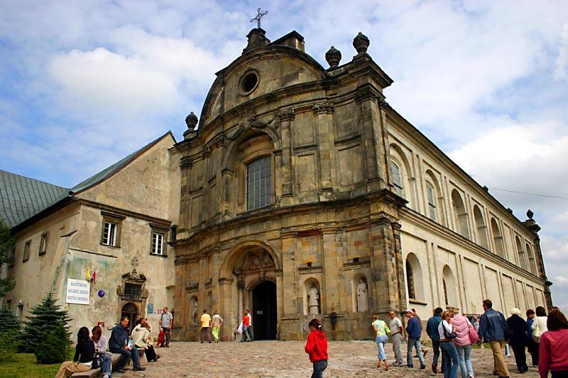 Swiety Krzyz in Poland